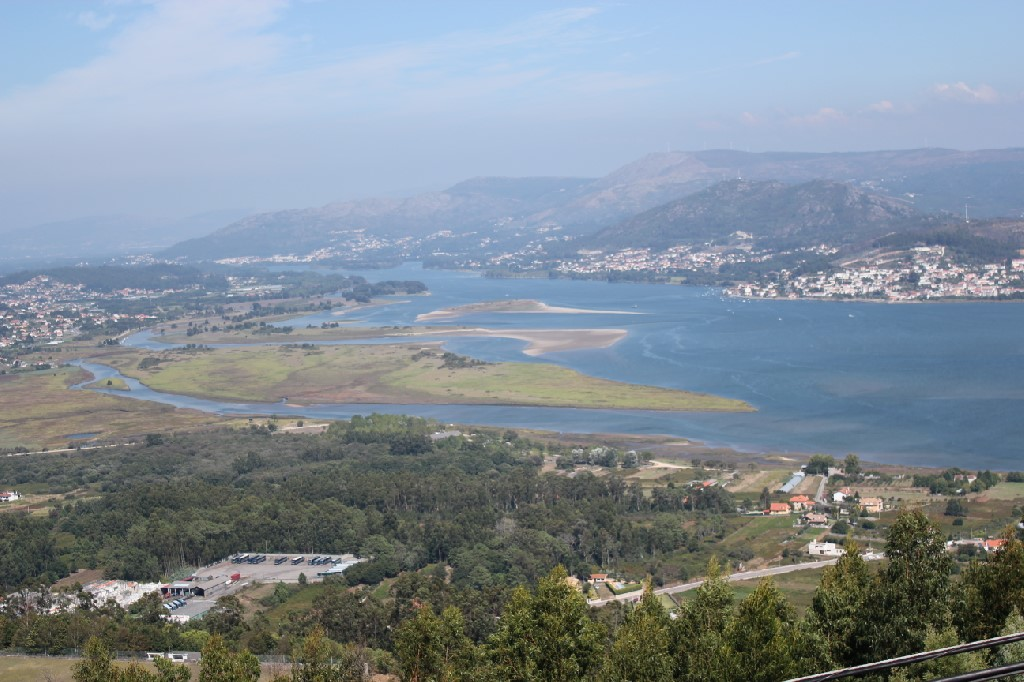 Rio Minho - Fronteira entre Portugal e Espanha